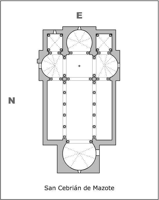 Planta de San Cebrián de Mazote